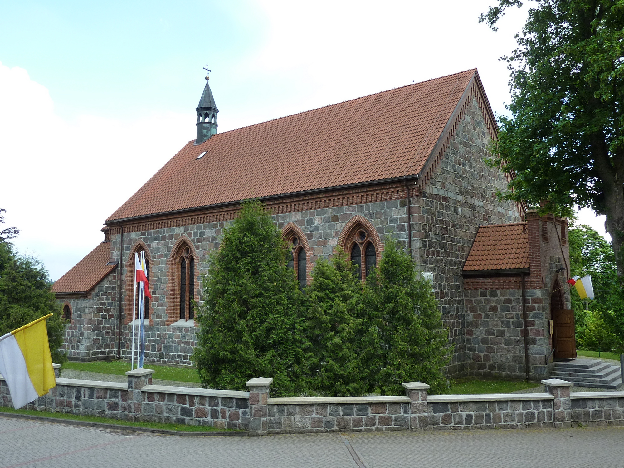 Kościół pw. Świętej Trójcy we wsi Sulęczyno (gmina Sulęczyno).